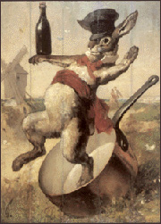 Lapin Agile by André Gill